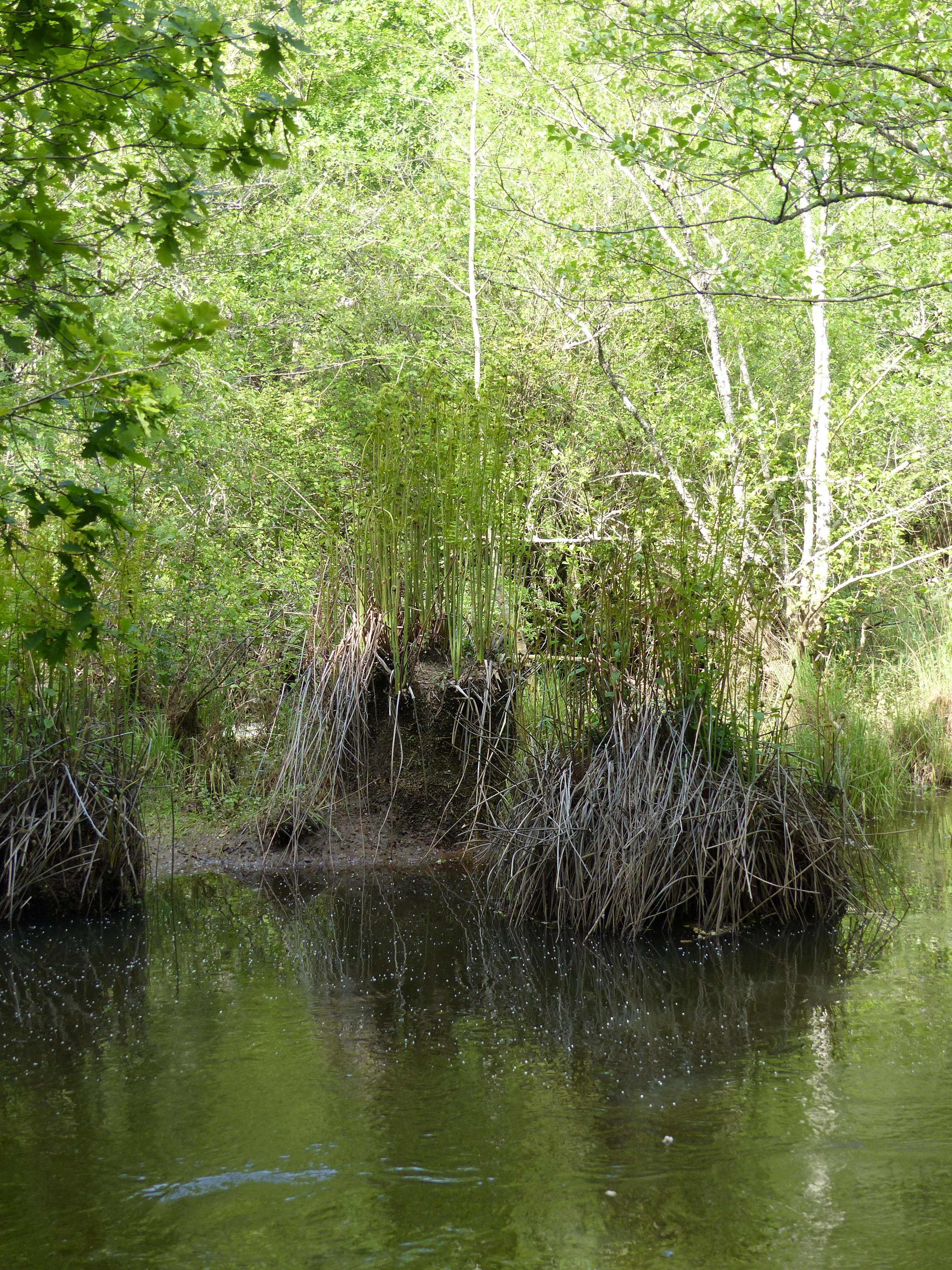 touradon à Osmunda regalis (osmonde royale), vallée de l'Eyre, Gironde, France